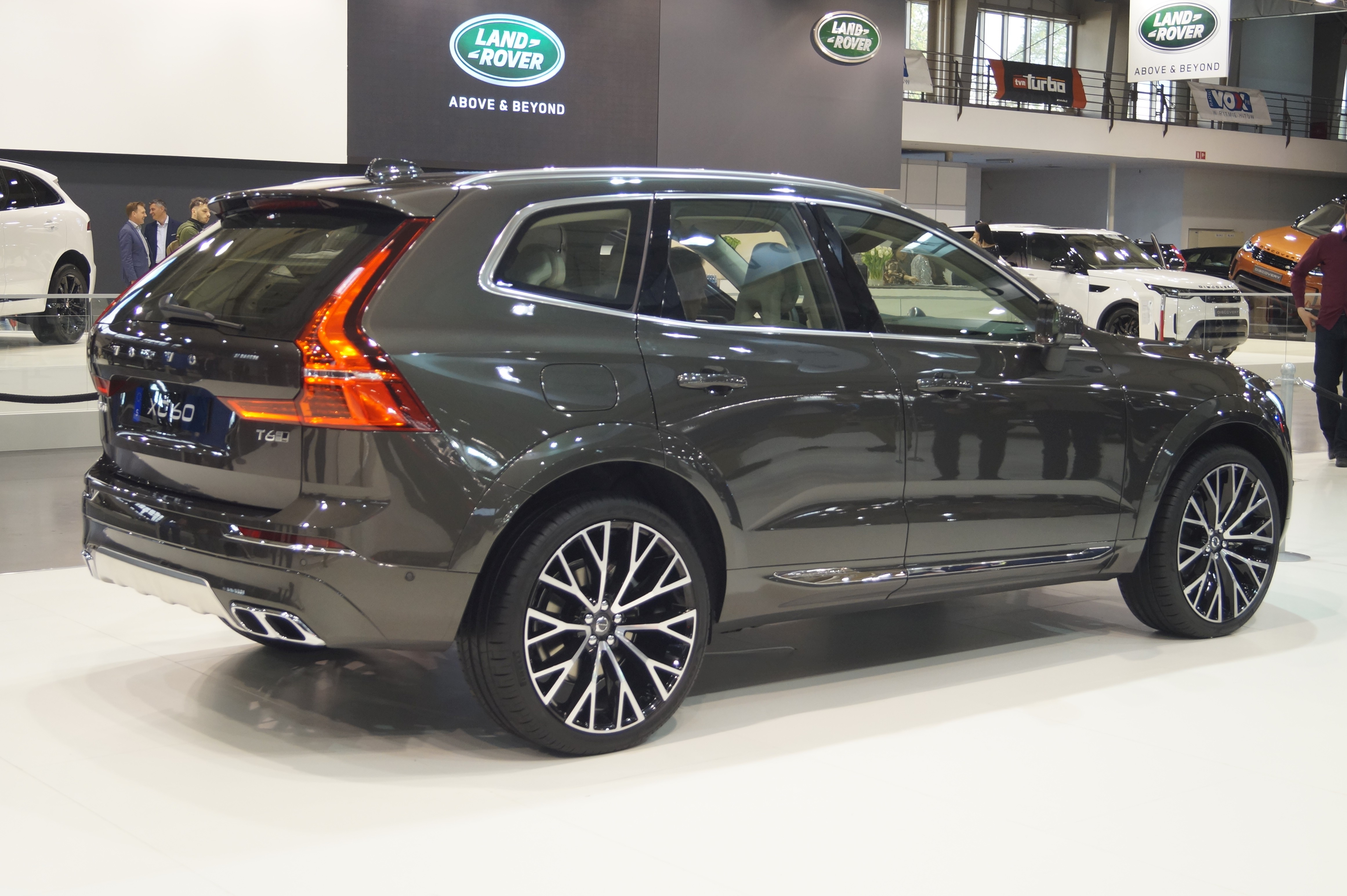 Prawy tył Volvo XC60 na Motor Show Poznań 2017.